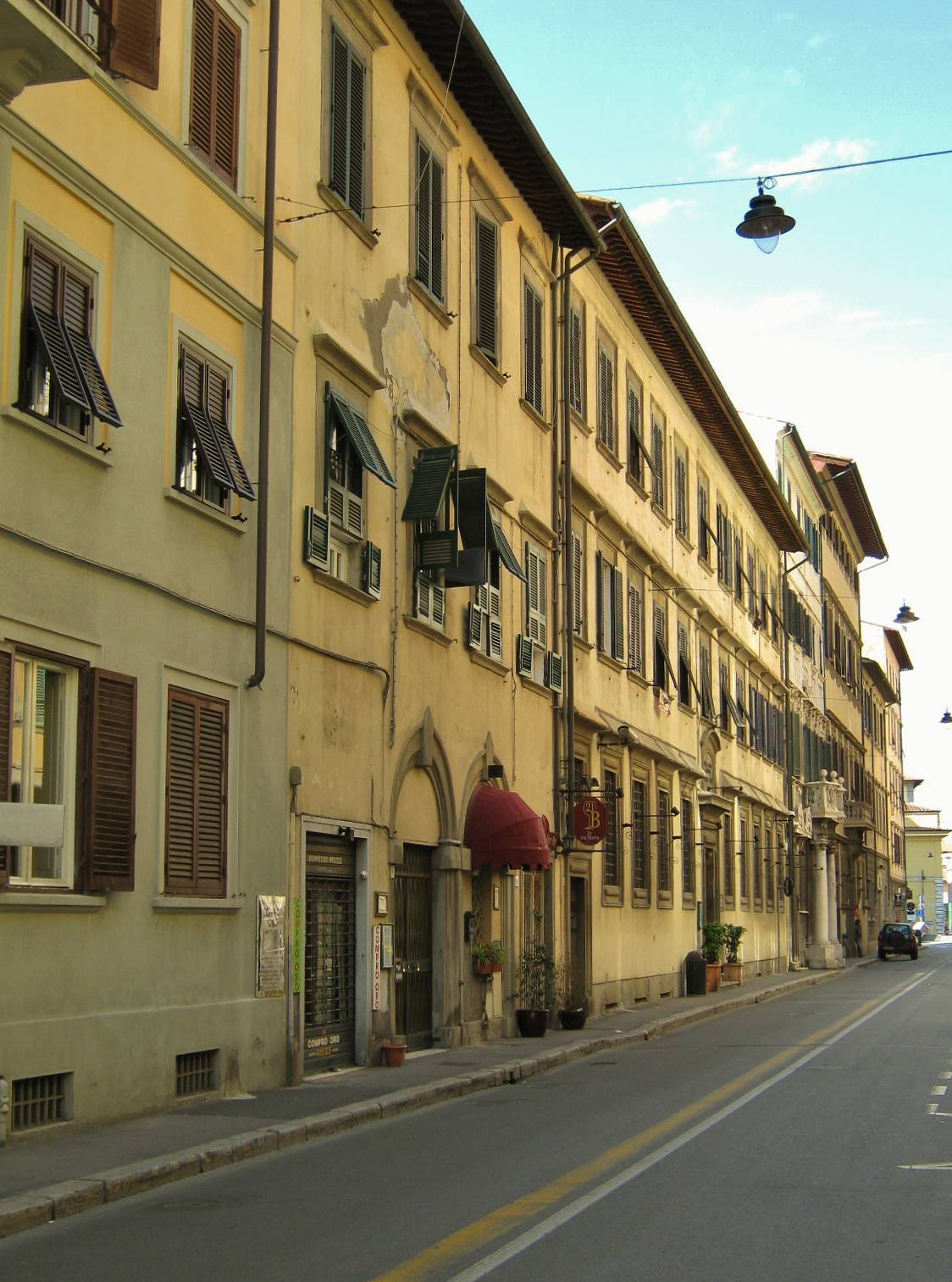 Livorno, palazzi di via Borra, quartiere Venezia Nuova.